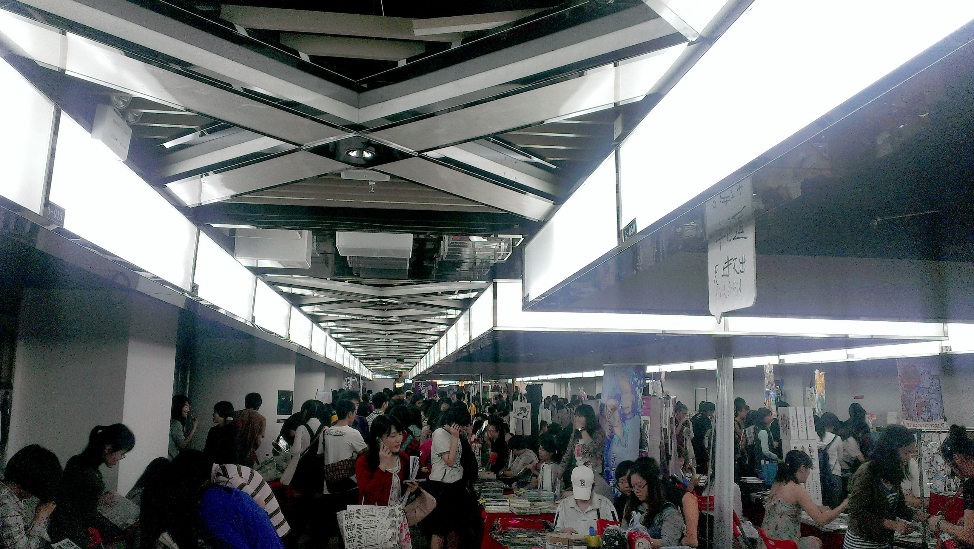 ADSL13于越富二期（即創興商業廣場）3樓舉行。